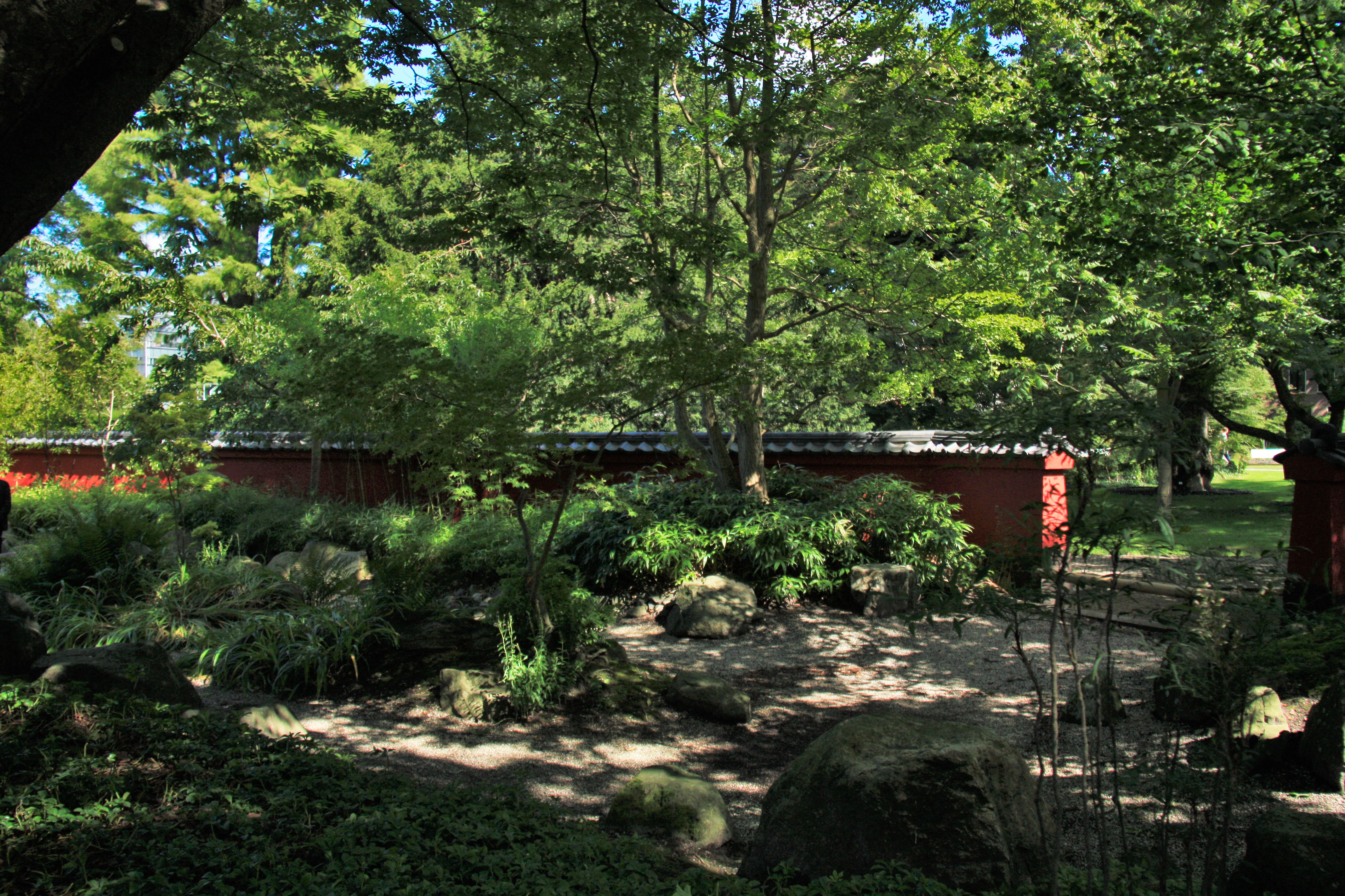 Японський сад у Лейденському ботанічному саду